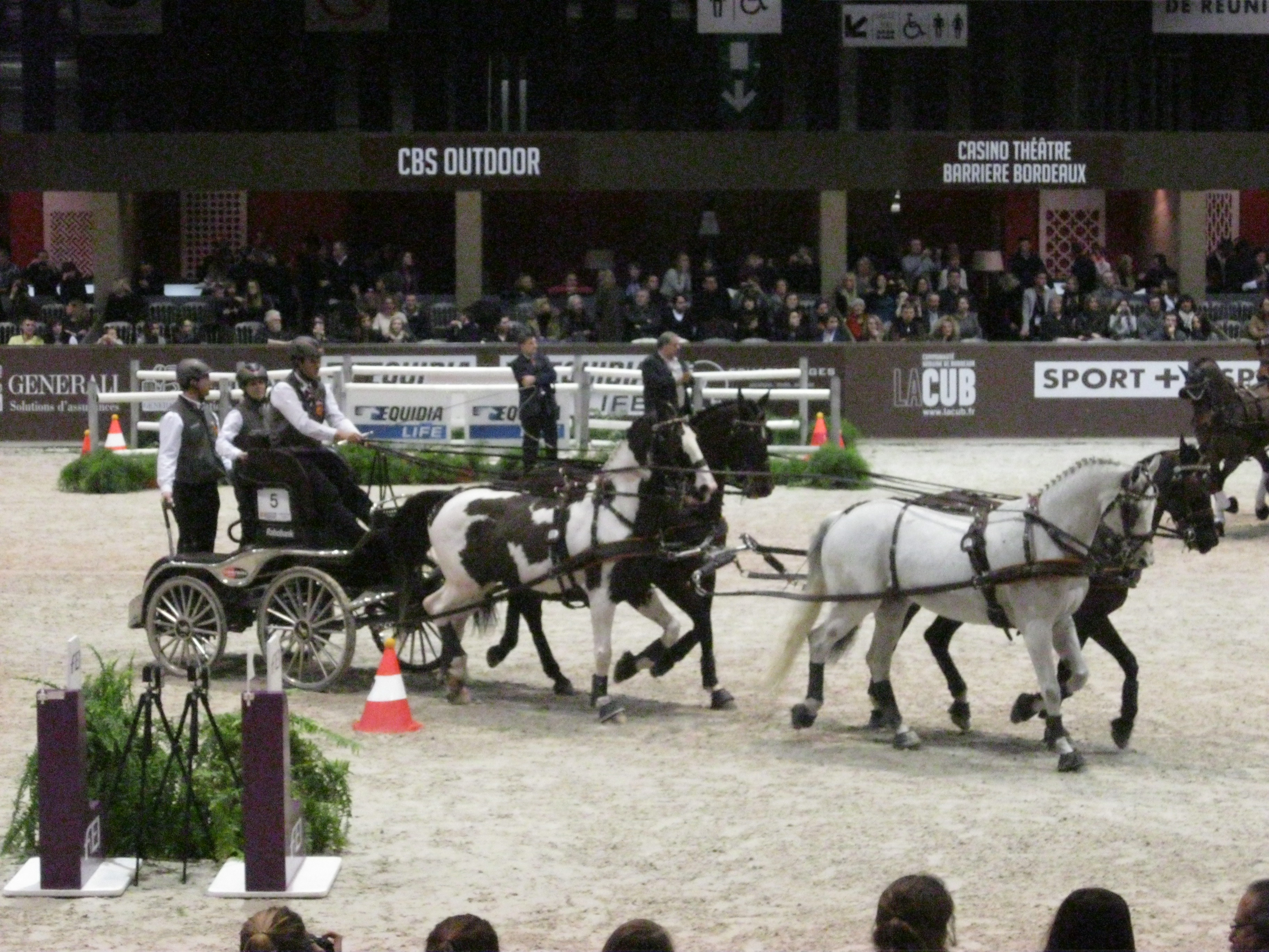 Le meneur néerlandais Kos De Ronde et ses quatre chevaux (Charley, Night', Celina et Mario) pendant la présentation des attelages au Jumping international de Bordeaux en 2013. Il remportera la finale de la coupe du monde d'attelage quelques instants plus tard.